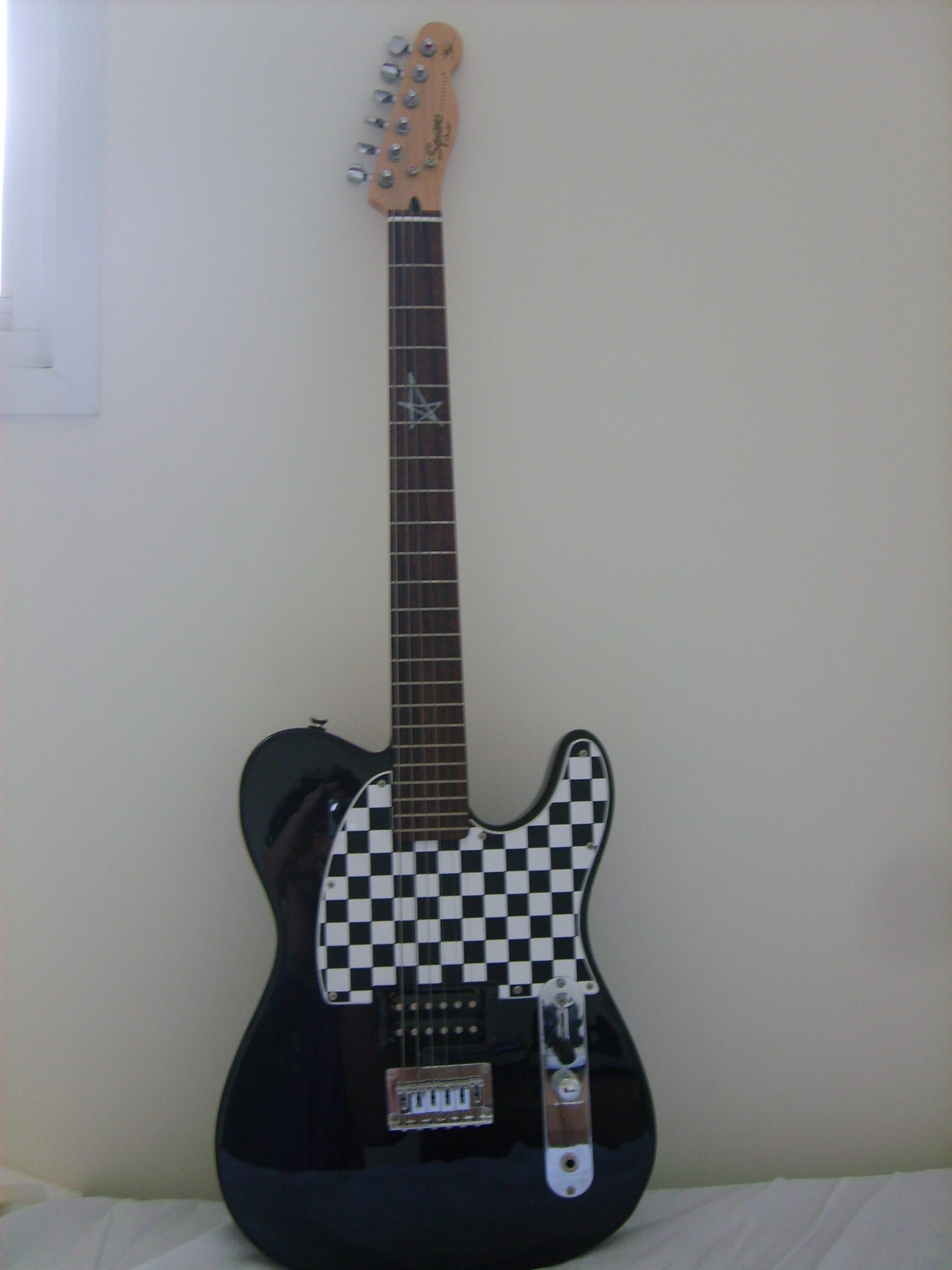 A guitarra telecaster da squeir